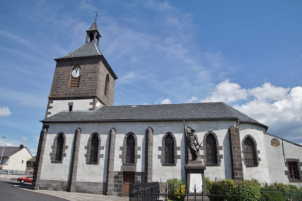 Puy de Dôme